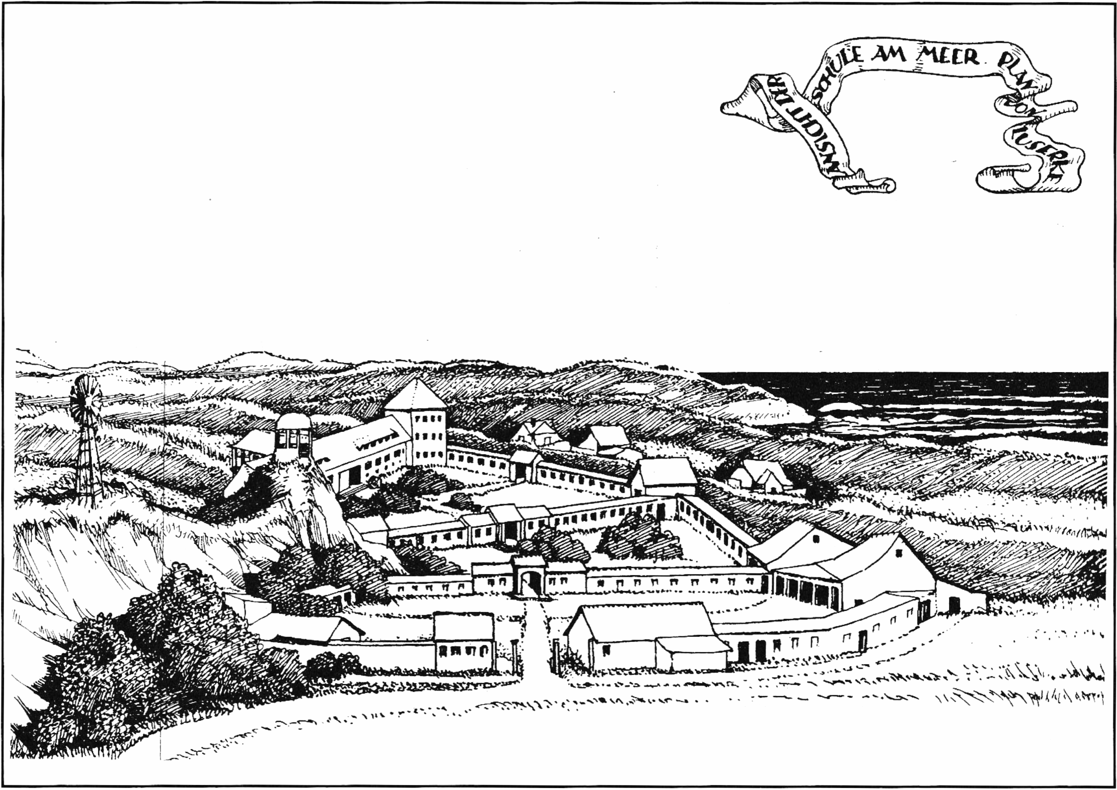 Zeichnung eines architektonischen Entwurfs für die geplante Schule am Meer auf der Nordseeinsel Juist (Ostfriesland) aus dem Jahr 1924. Die anthroposophisch inspirierte Schulanlage passt sich scheinbar organisch in die natürlich geformte Umgebung an der Augustendüne im Westteil der Insel ein. Der Plan erinnert wegen der langen Gänge, welche die einzelnen Gebäude bzw. Gebäude-Komplexe verbinden, an eine mittelalterliche Klosteranlage. Dadurch ergibt sich der subjektive Eindruck einer Wehrhaftigkeit. Rechts hinter der Schulanlage erkennt man einzelne Häuser, die für Lehr- und Hilfskräfte vorgesehen waren. Dort sollten auch Wirtschaftshöfe entstehen, um einen gewissen Grad der Selbstversorgung zu ermöglichen.